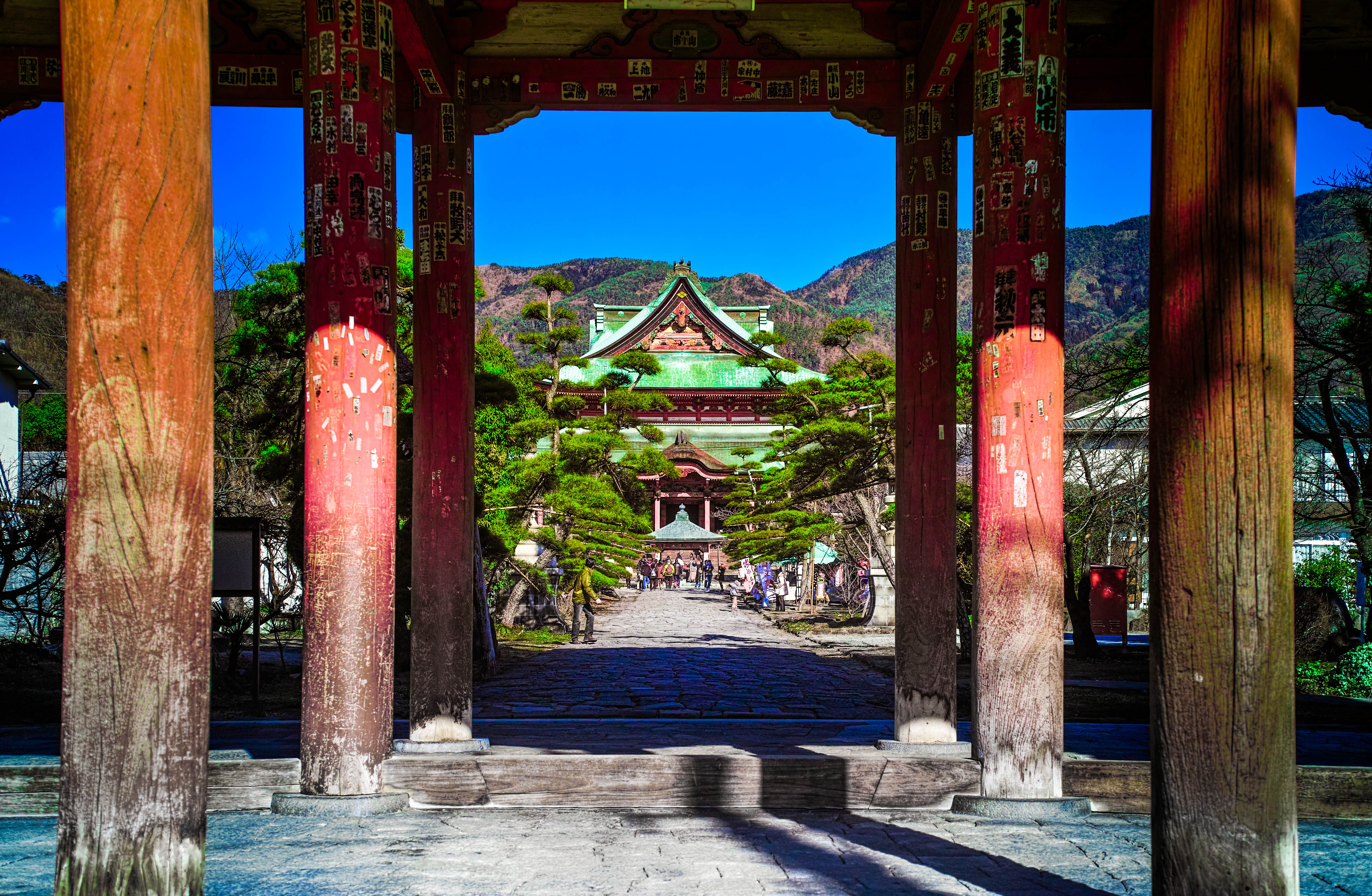 甲斐善光寺の拝殿を山門から見る